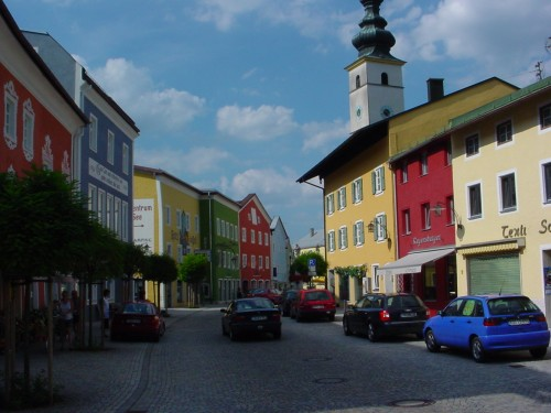 Waging am See, Häuser nahe dem Marktplatz